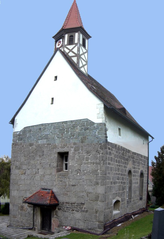 Romanische Kirche Sankt Ulrich in Wilchenreuth, 12. Jdh.